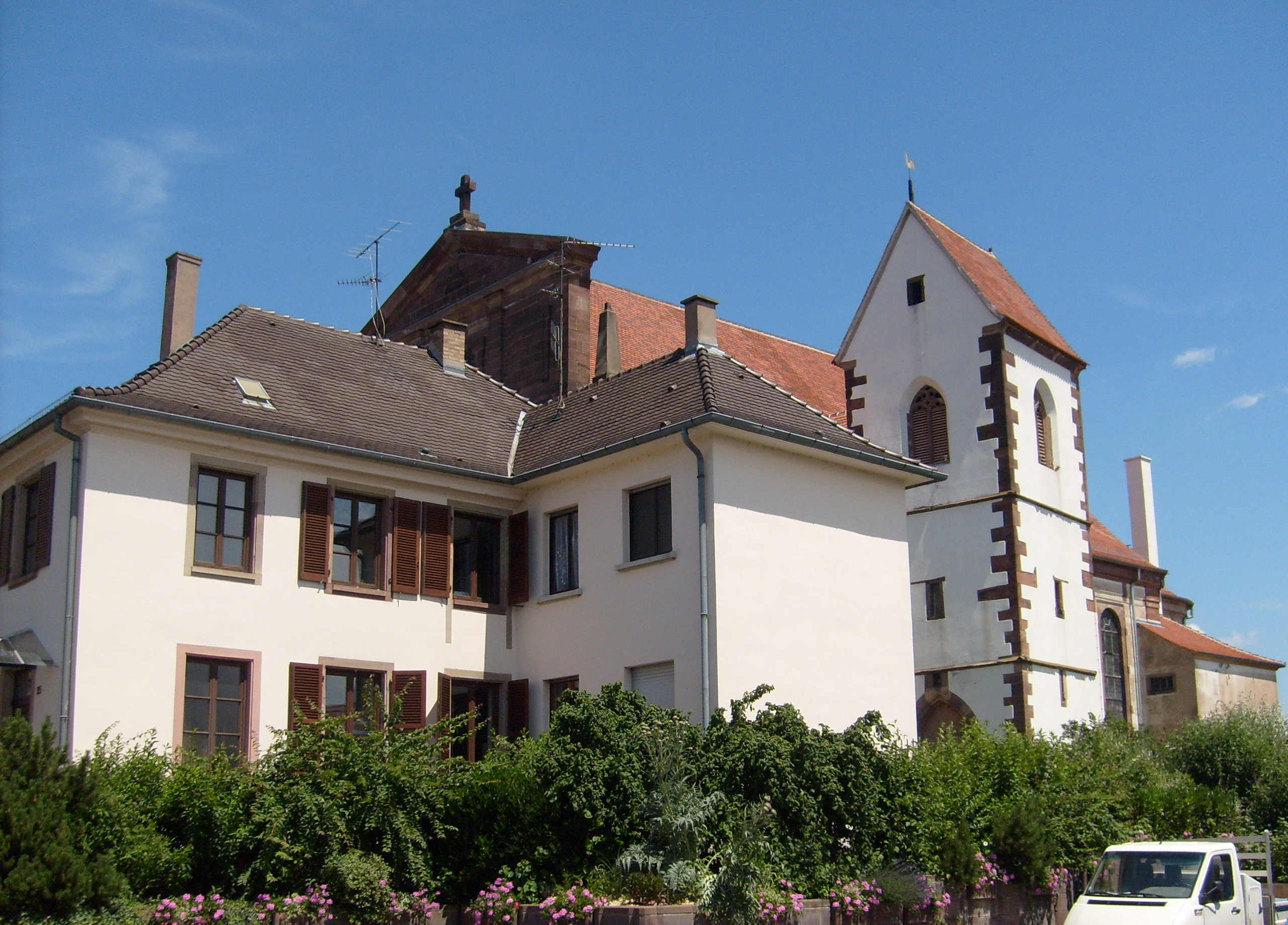 luterana kirko de Bischheim, Alzaco